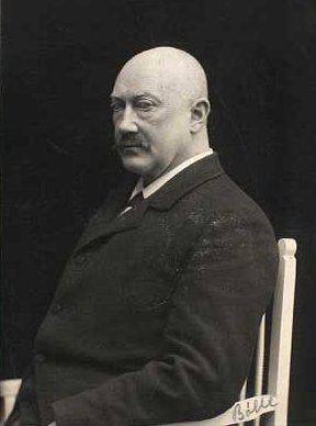 Thorvald Bindesbøll (1846-1908), dansk arkitekt